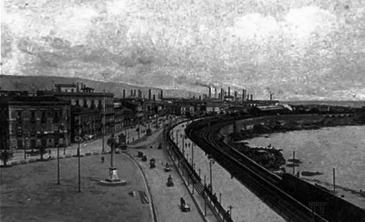 Catania. Vista della ferrovia, della stazione centrale e del complesso industriale con le ciminiere.